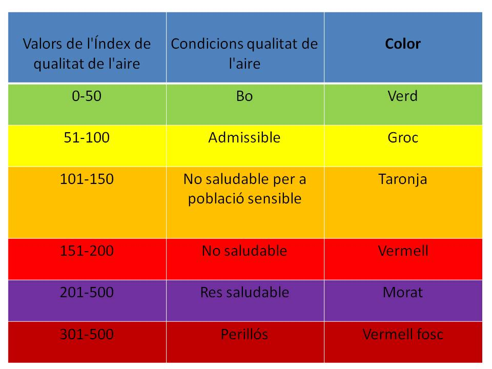 Niveles de calidad del aire